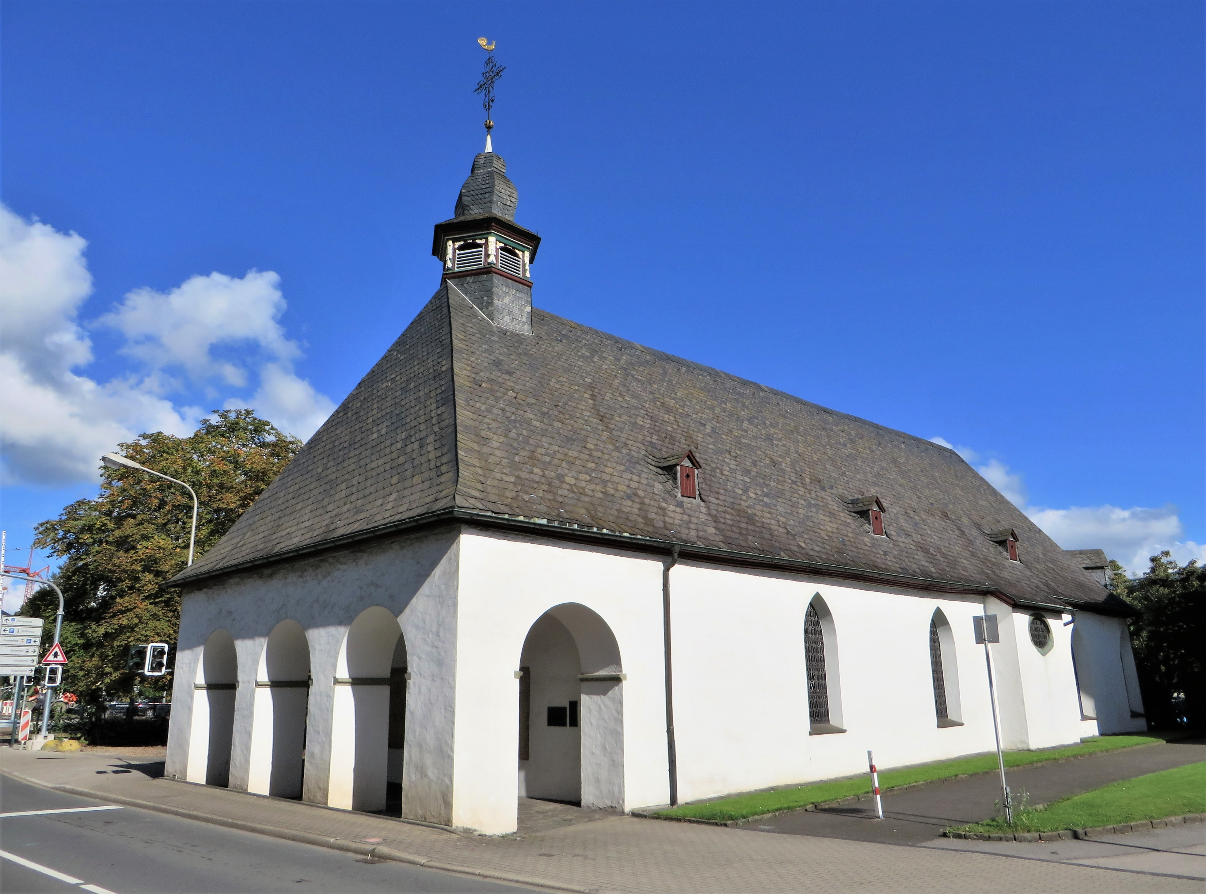 Denkmalgeschützte ehemalige katholische Hospitalkirche St. Barbara in Attendorn, Am Wassertor 11. Erbaut ab 1306 bis 1317 als Kapelle, von 1697 bis 1726 erweitert und schließlich zur Hospitalkirche ausgebaut. Seit der Barockzeit wurde das Äußere nicht mehr verändert. Noch 1838 als Wallfahrtskirche bezeichnet. Im Zweiten Weltkrieg stark beschädigt, danach von 1953 bis 1957 restauriert. This is a photograph of an architectural monument.It is on the list of cultural monuments of Attendorn